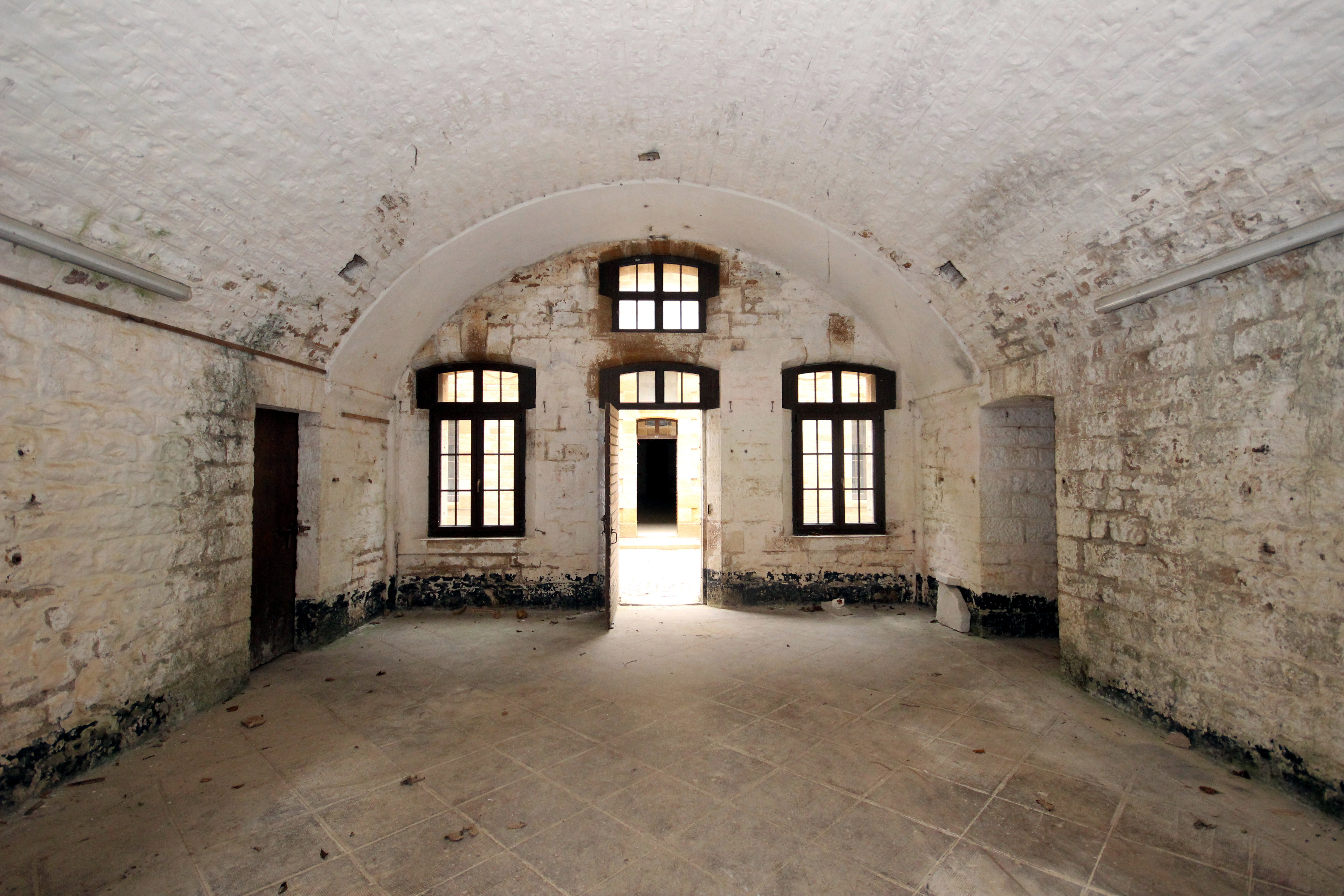 Une chambrée de troupe du fort du cognelot